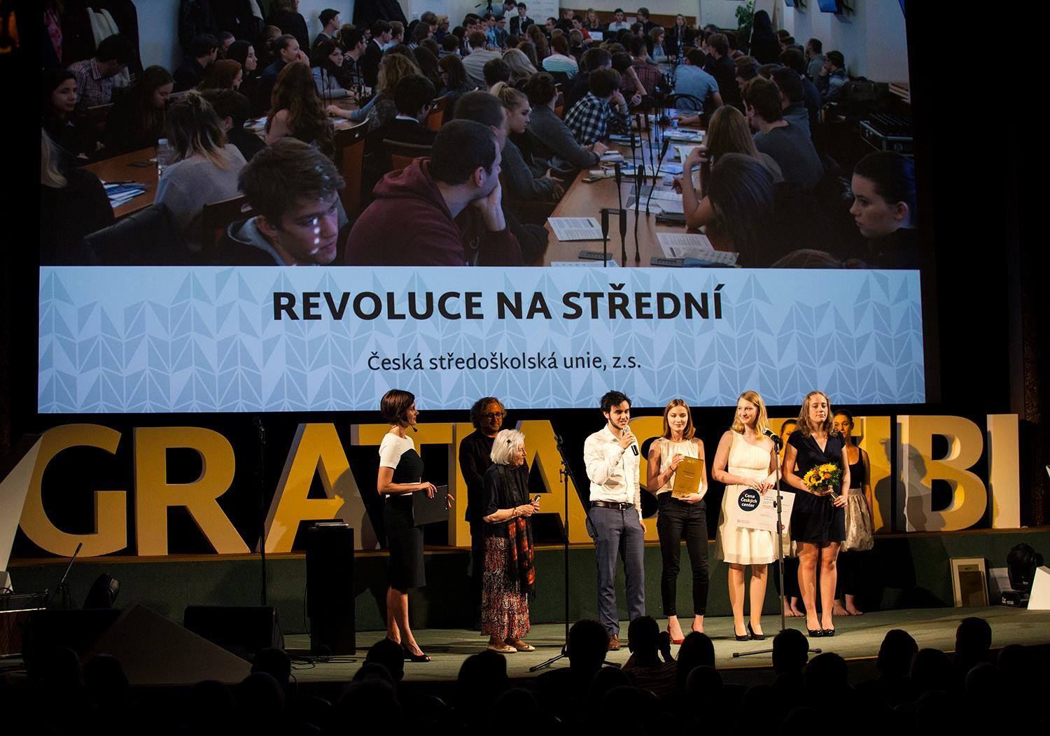 Fotografie z předávání cen Gratias Tibi v roce 2017. Výhercem kategorie středních škol se stala Česká středoškolská unie a kampaň Revoluce na střední.